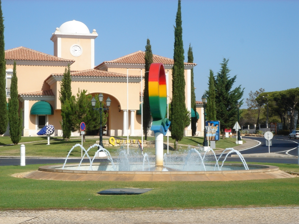 Foto de Valter Jacinto - O autor quer esta foto apagada!